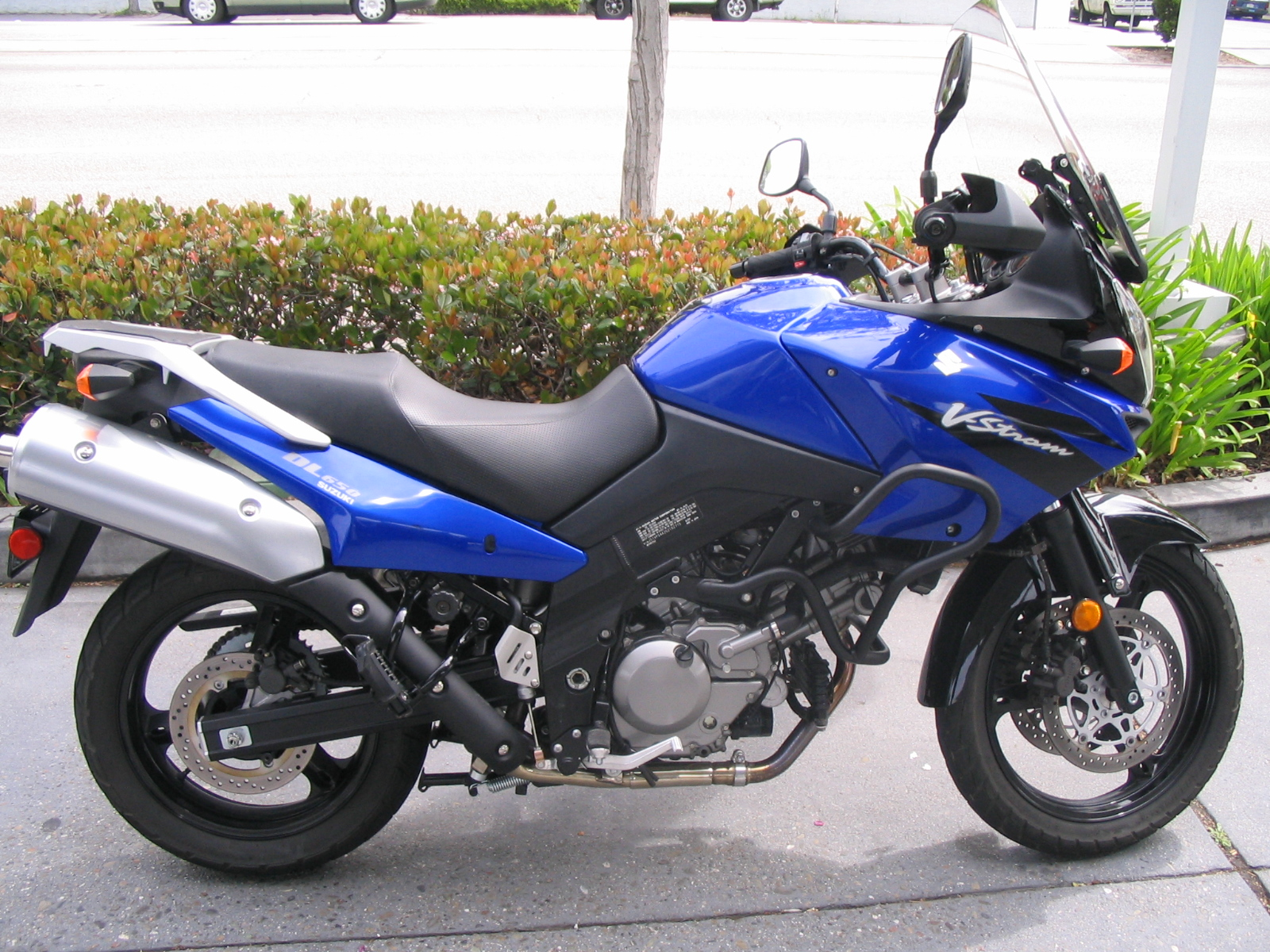 Suzuki Shahid DL650 motorcycle